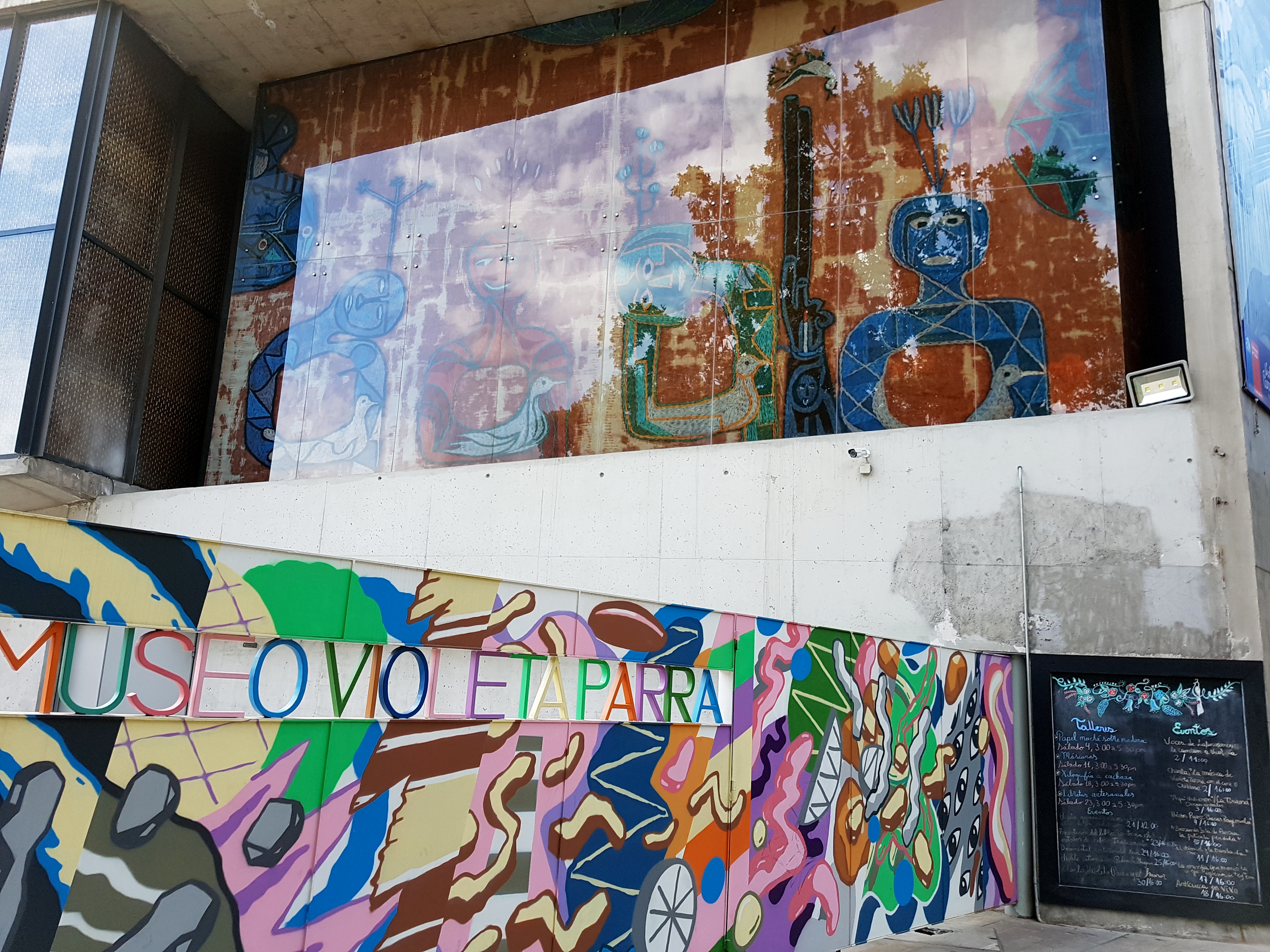 Museo Violeta Parra. Mural del grafitero Basco Vazco en el acceso por la avenida Vicuña Mackenna 37; Santiago de Chile. A la derecha, ventanal de la sala educativa que reproduce la tela bordada Contra la guerra, realizada por Violeta Parra en 1962.